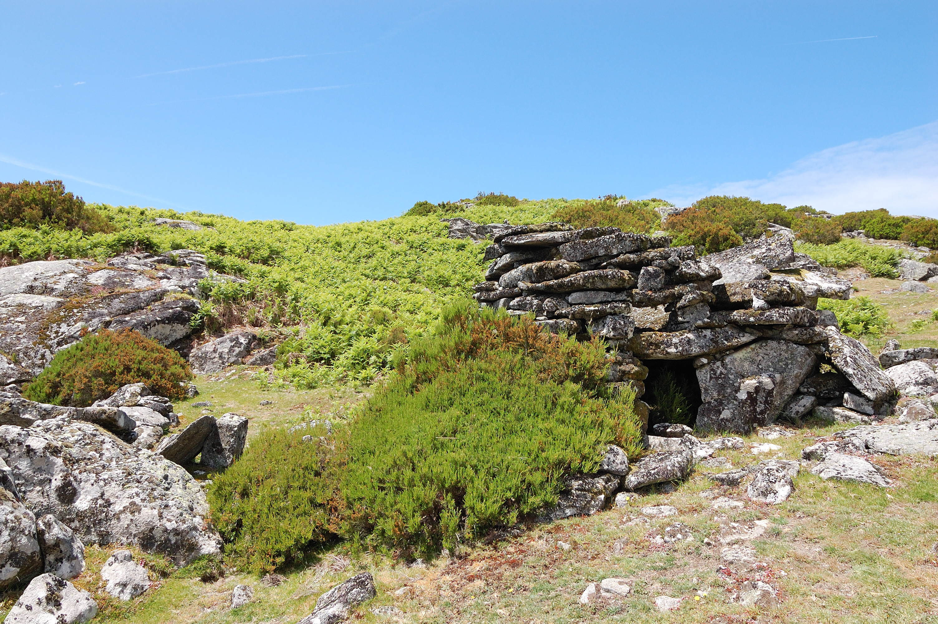 Branda de Gorbelas, Portugal [2011]